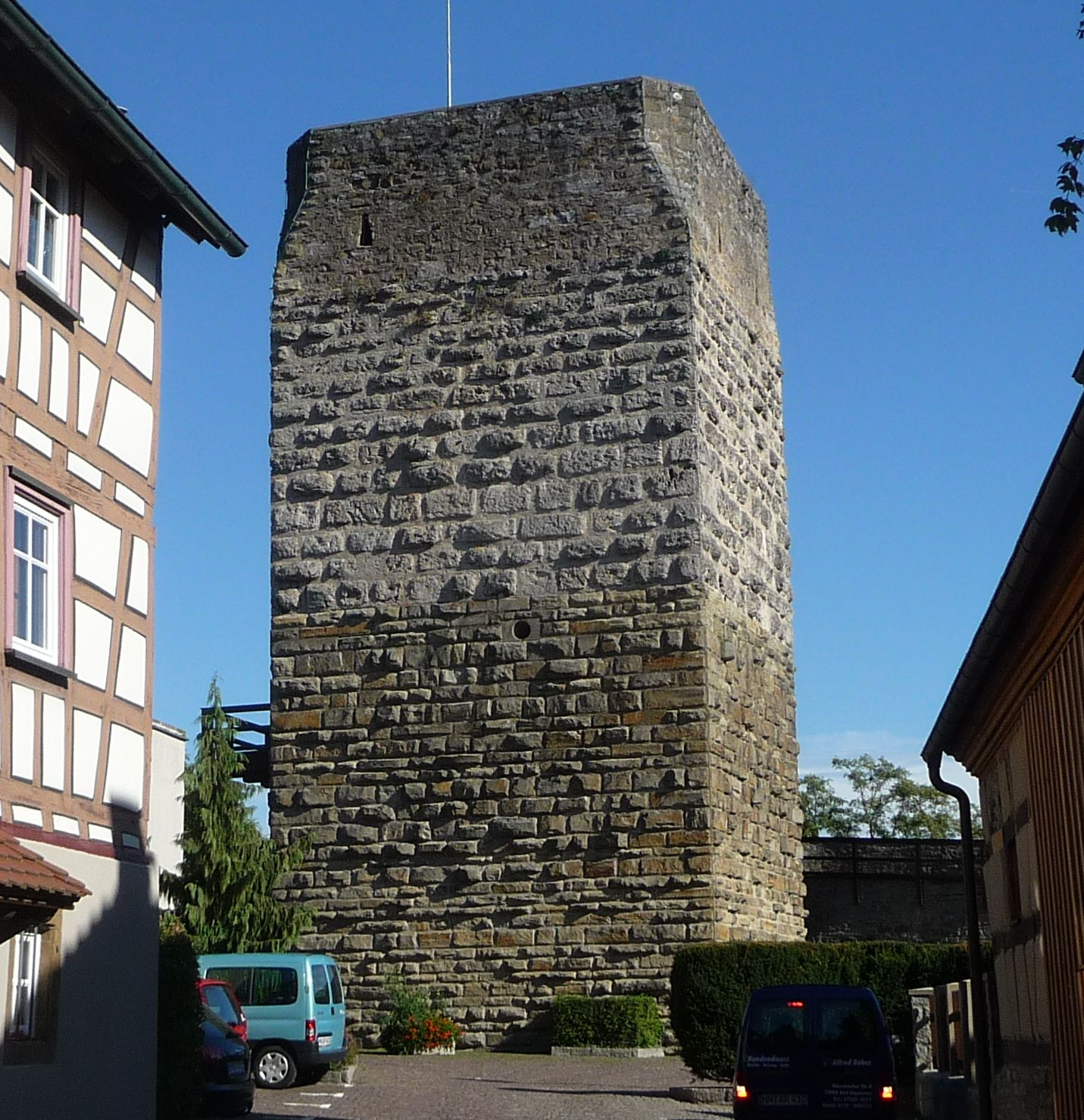 Roter Turm in Bad Wimpfen